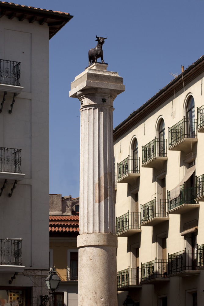 unidentified Cultural Heritage Spain